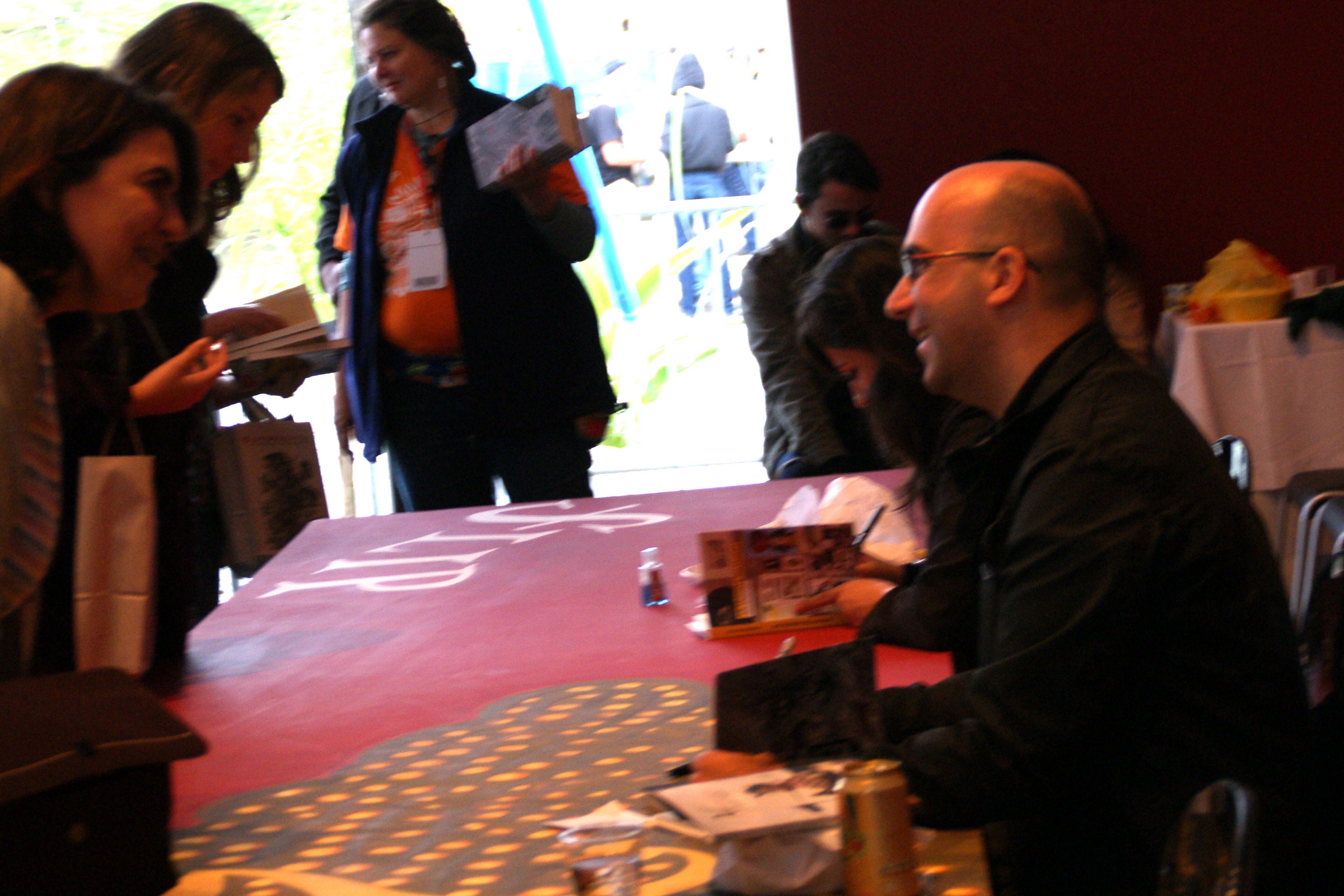 valter hugo mãe autografando meu "a máquina de fazer espanhóis"